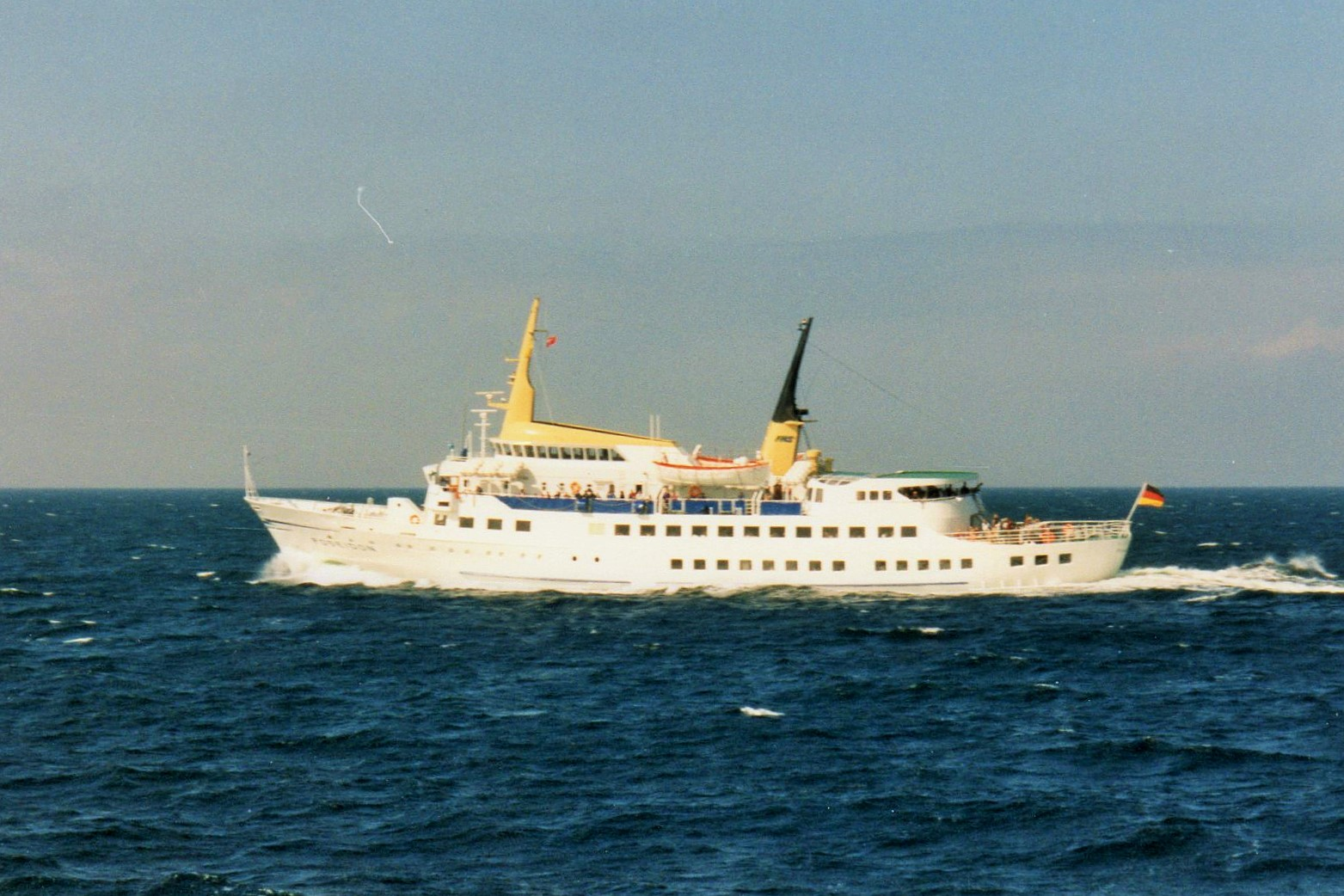 MS Poseidon 1996 östlich von Fehmarn auf Butterfahrt nach Dänemark